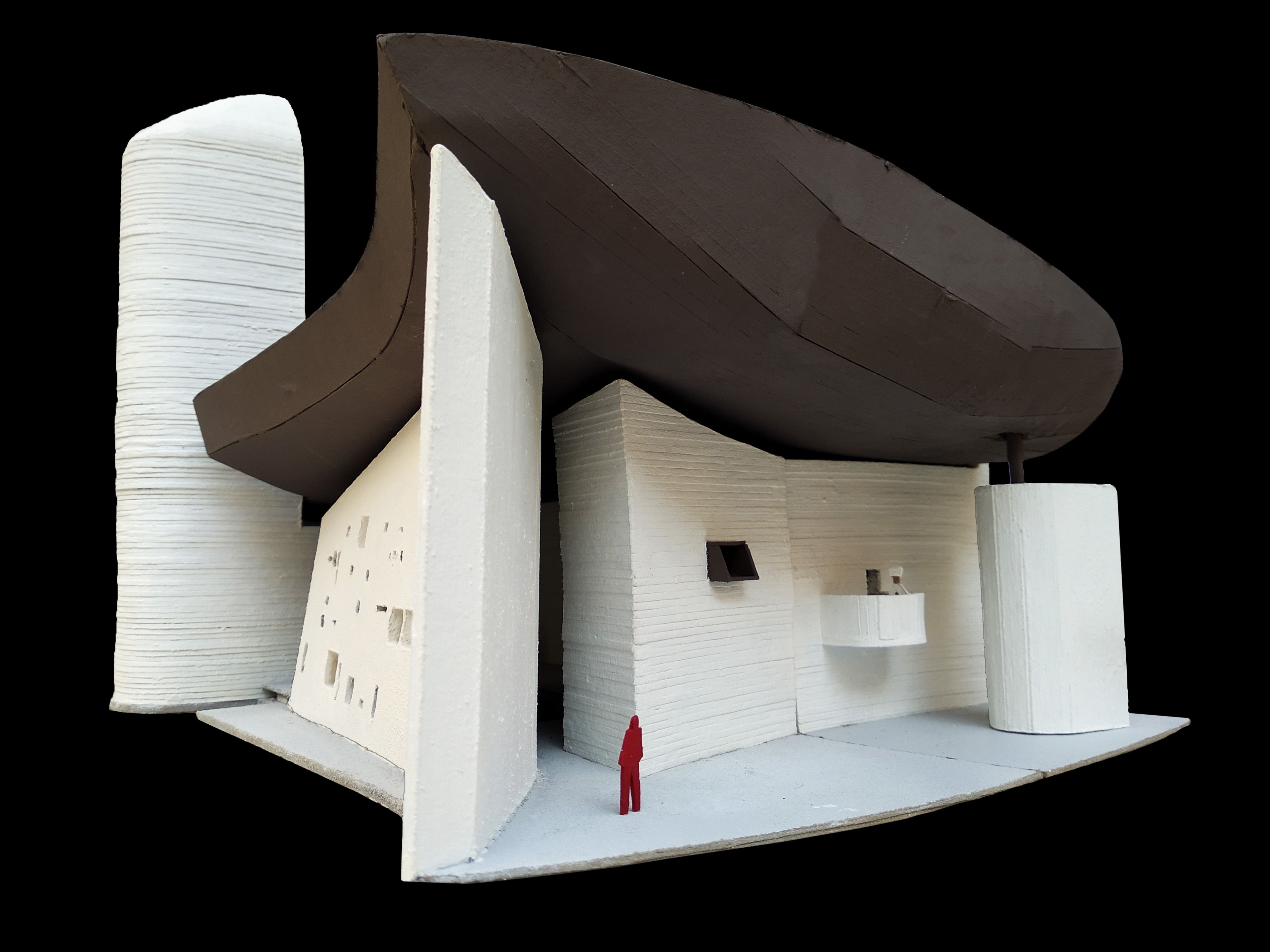 Μακέτα του παρεκκλησίου (φοιτητές ΕΜΠ)